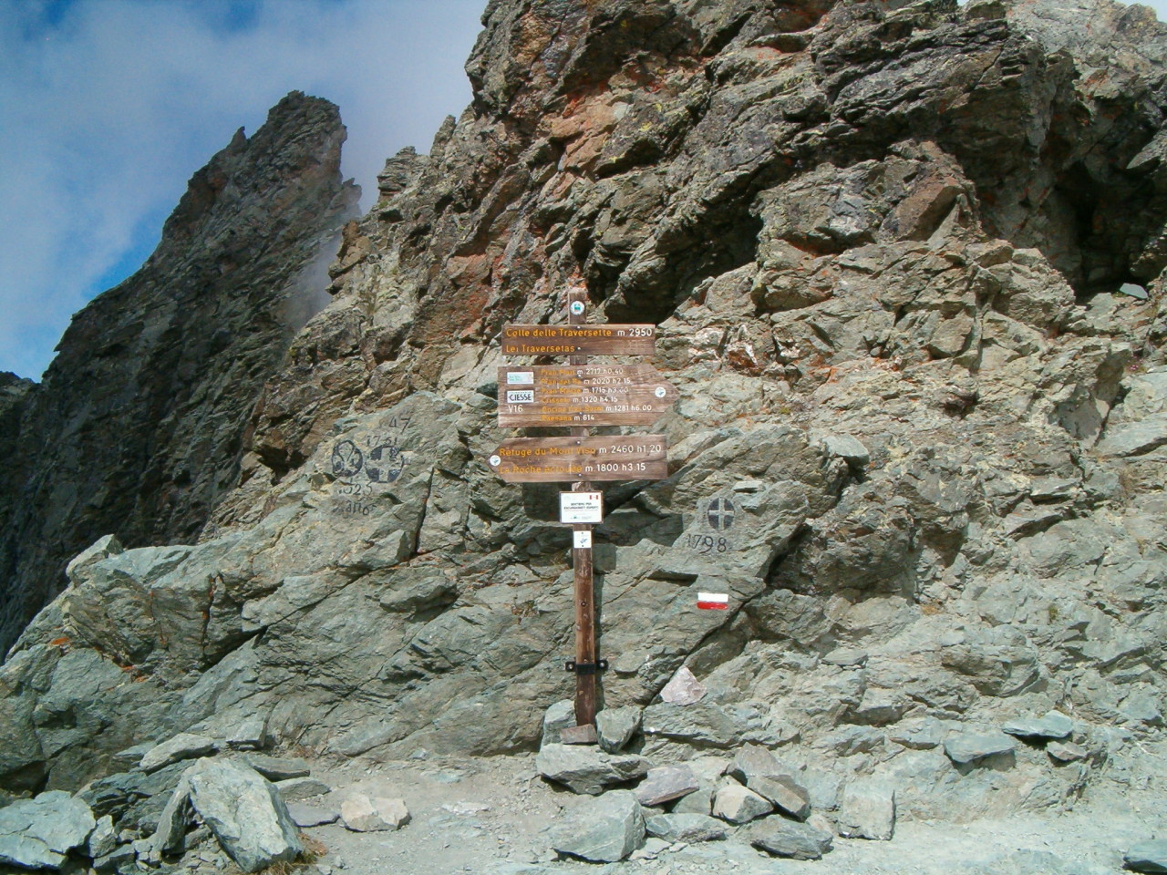 Il Colle delle Traversette. Palina indicatrice e vecchi segnali di confine tra Regno di Sardegna e Regno di Francia